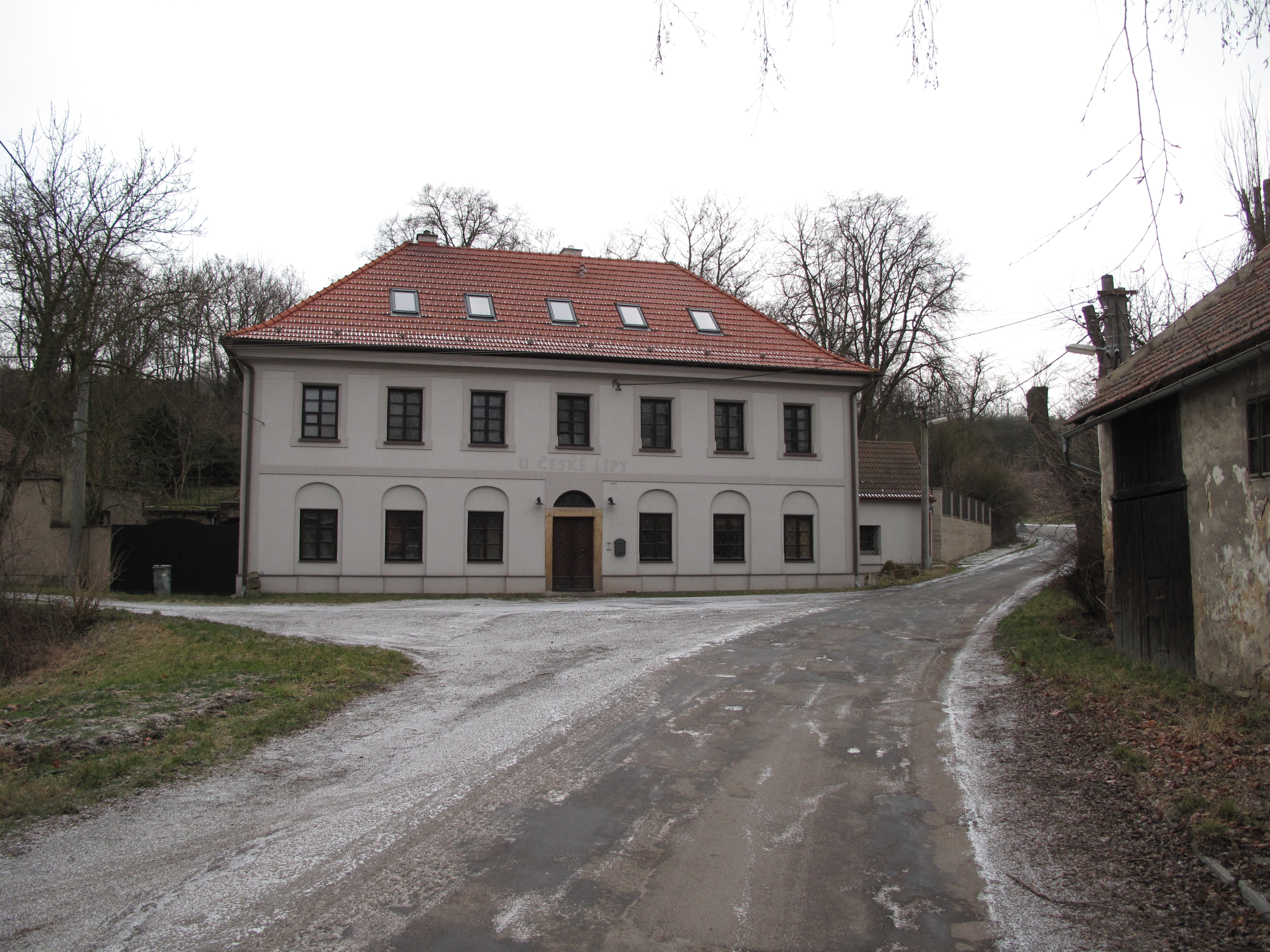 Dům v Otrubách. Okres Kladno, Česká republika.